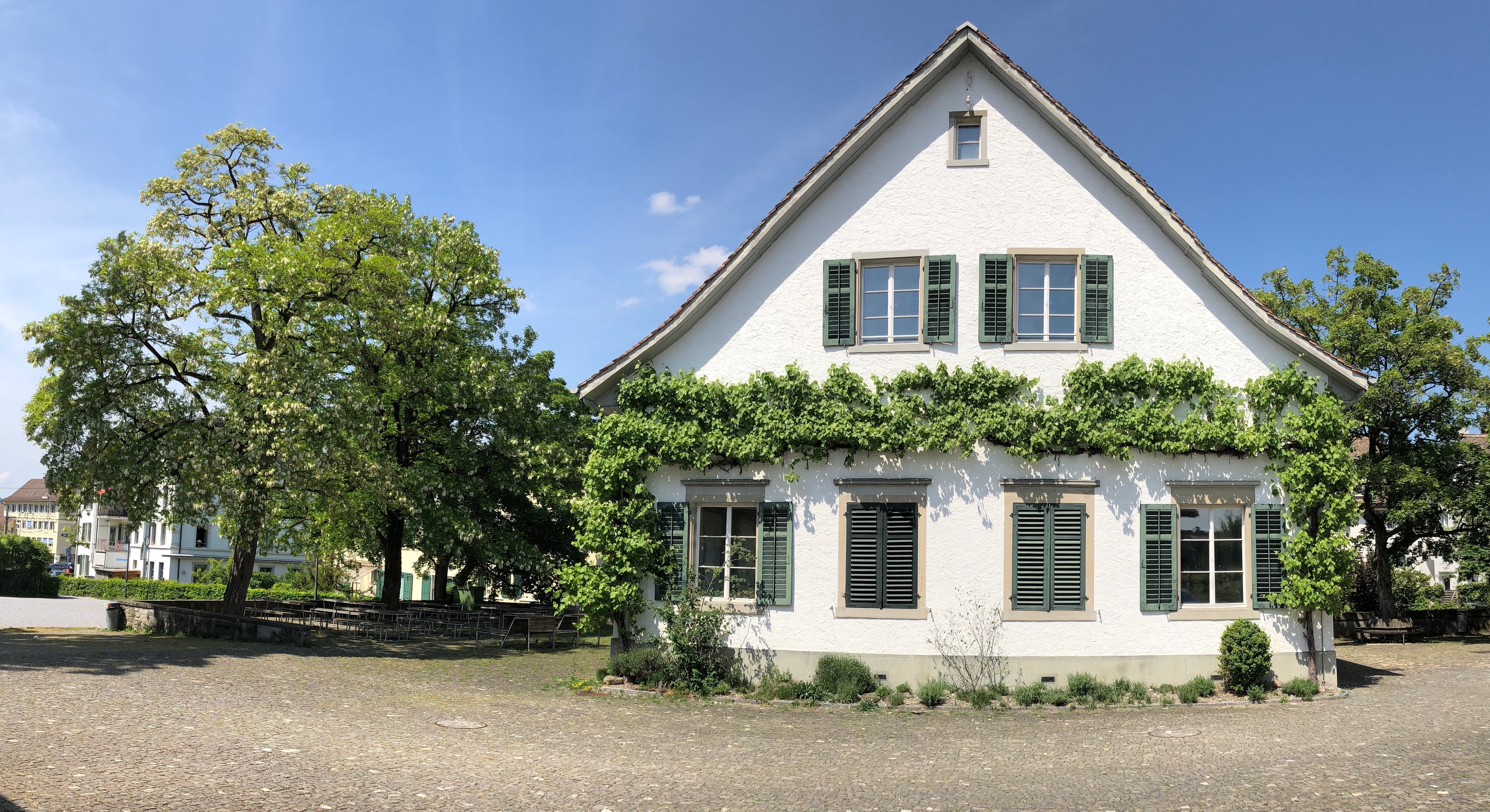 Biohaus, Ansicht von Süden